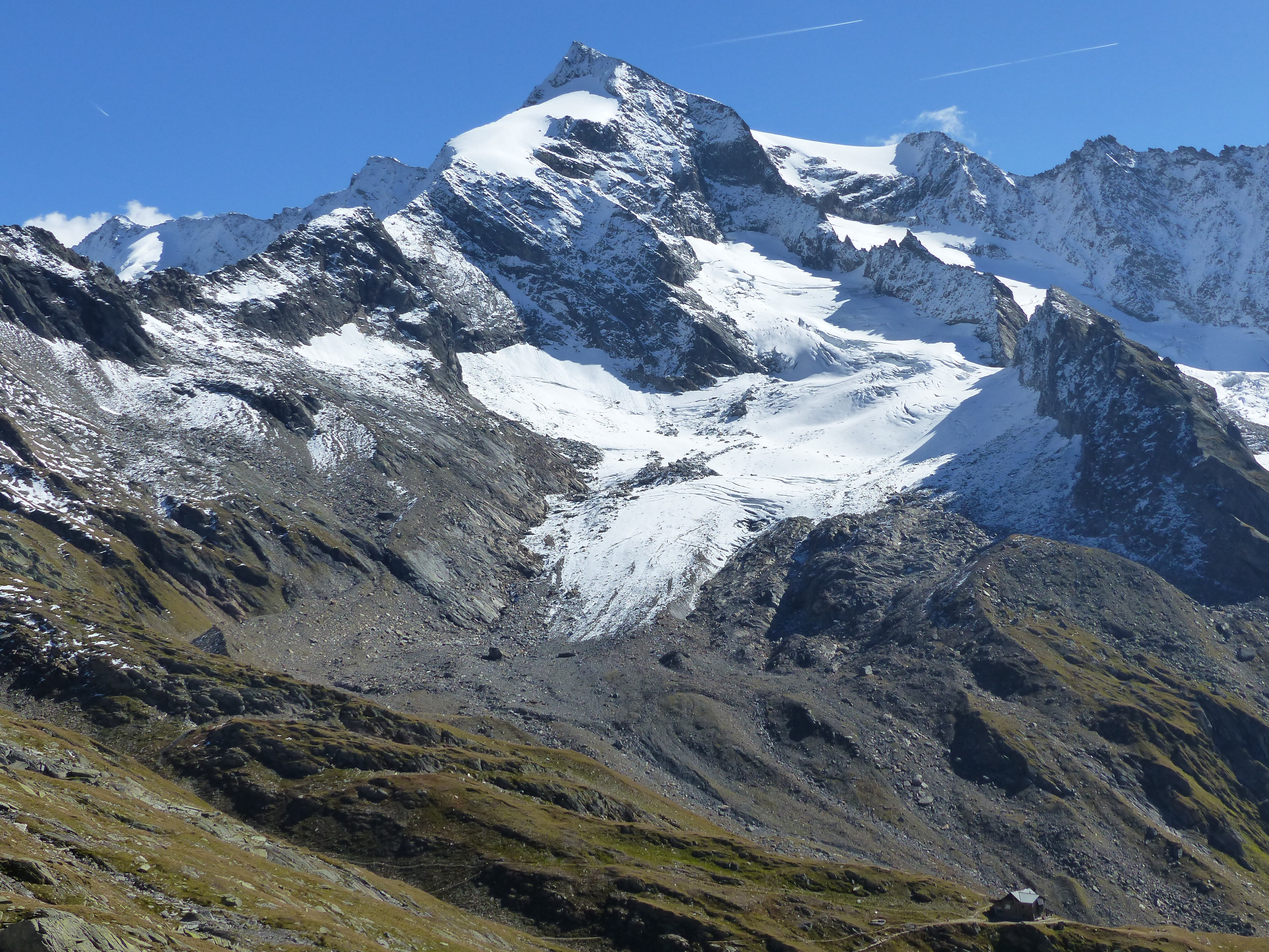 Dreiherrenspitze mit Birnlückenhütte. Aufgenommen vom Lausitzer Weg.